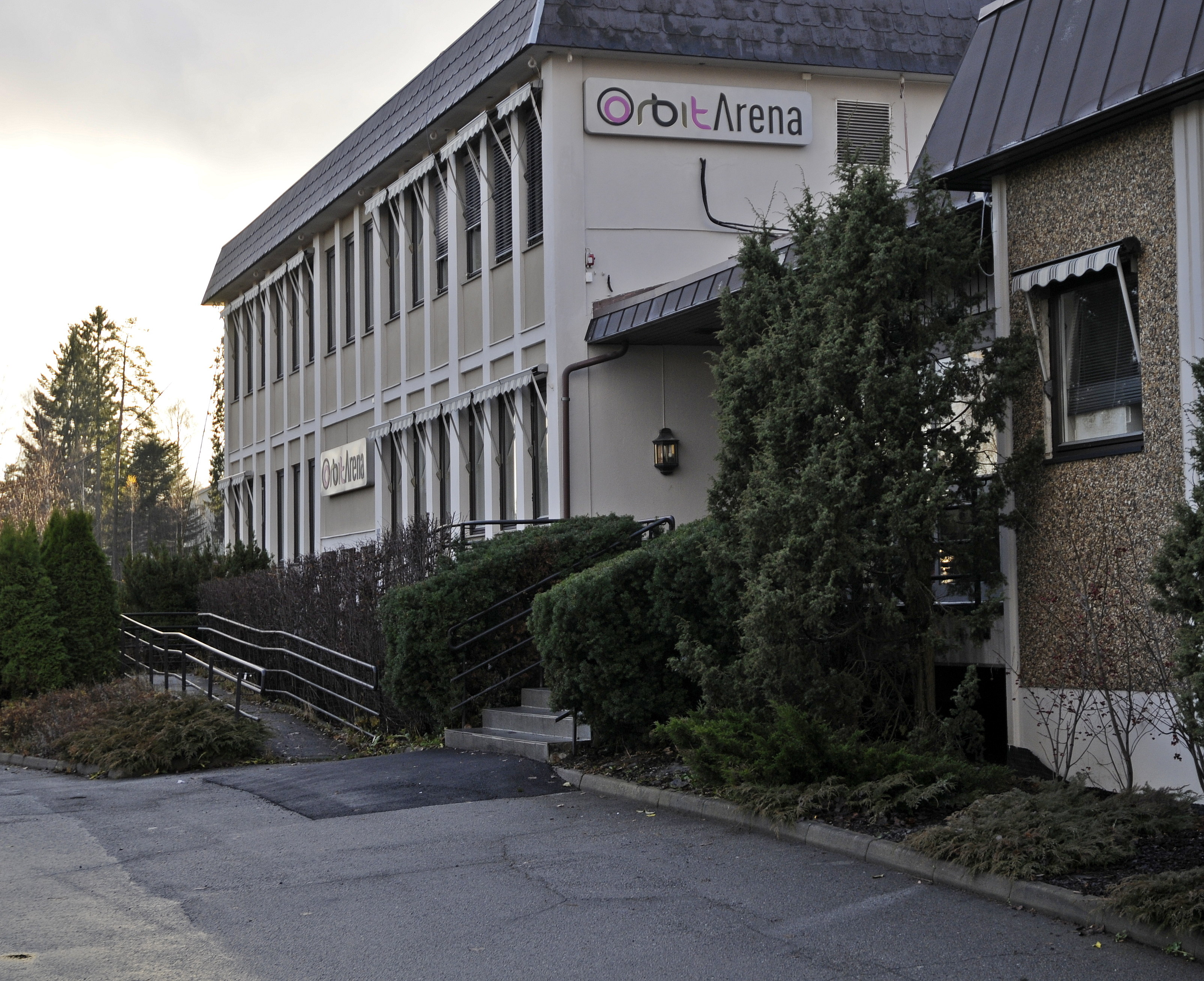 OrbitArena på Jessheim